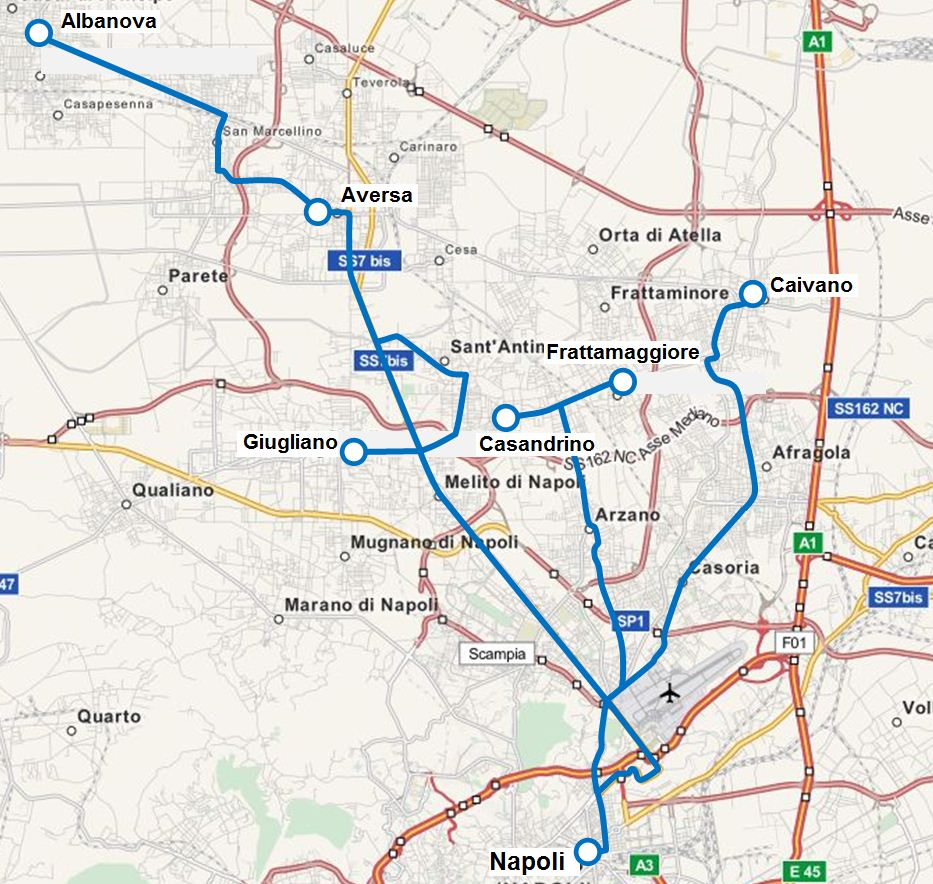 Tranvie provinciali napoletane